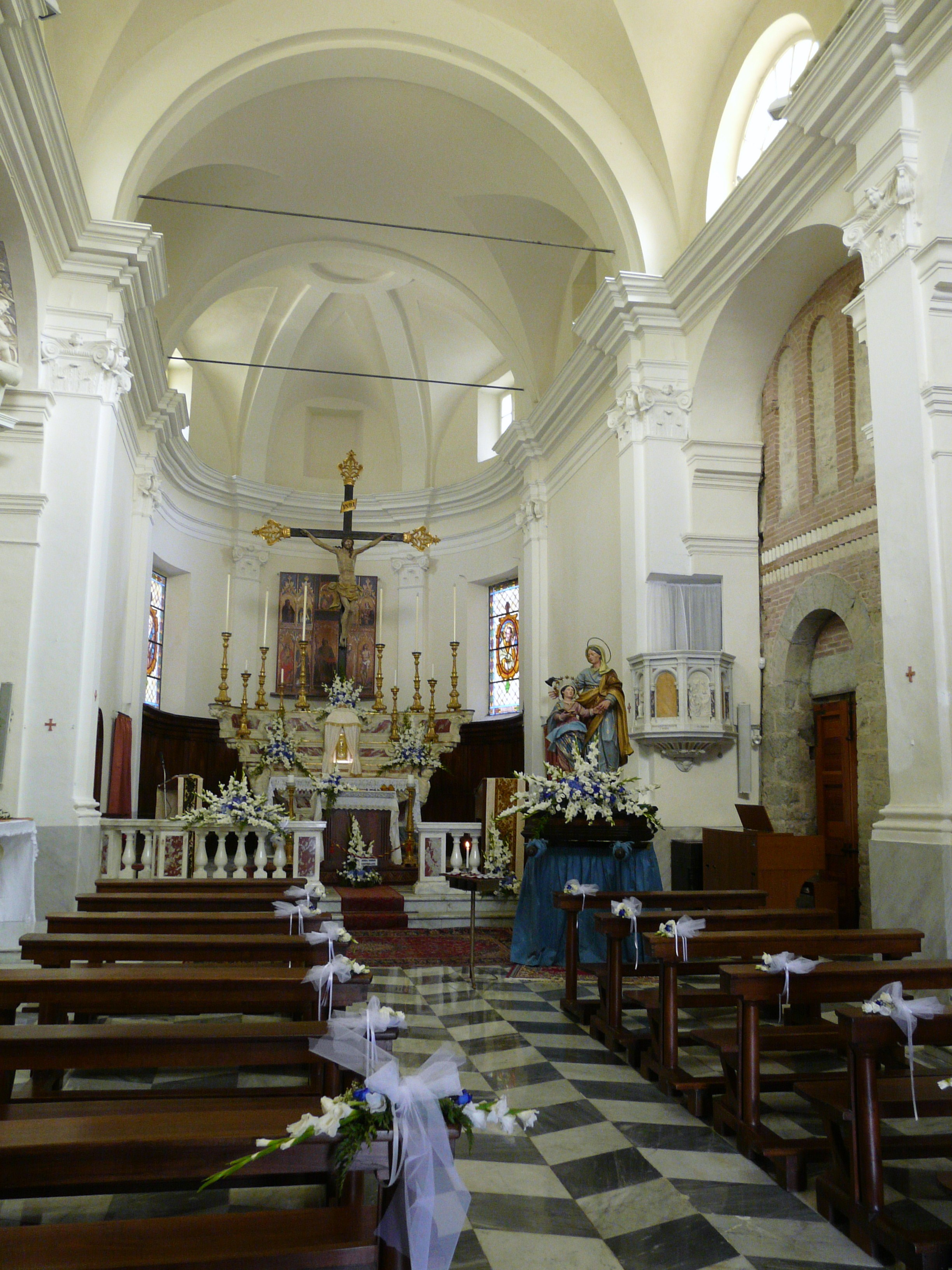 La navata centrale dell'abbazia di Sant'Andrea di Borzone, Borzonasca, Liguria, Italia